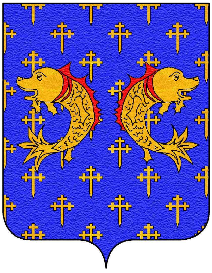 Stemma della famiglia De' Pazzi